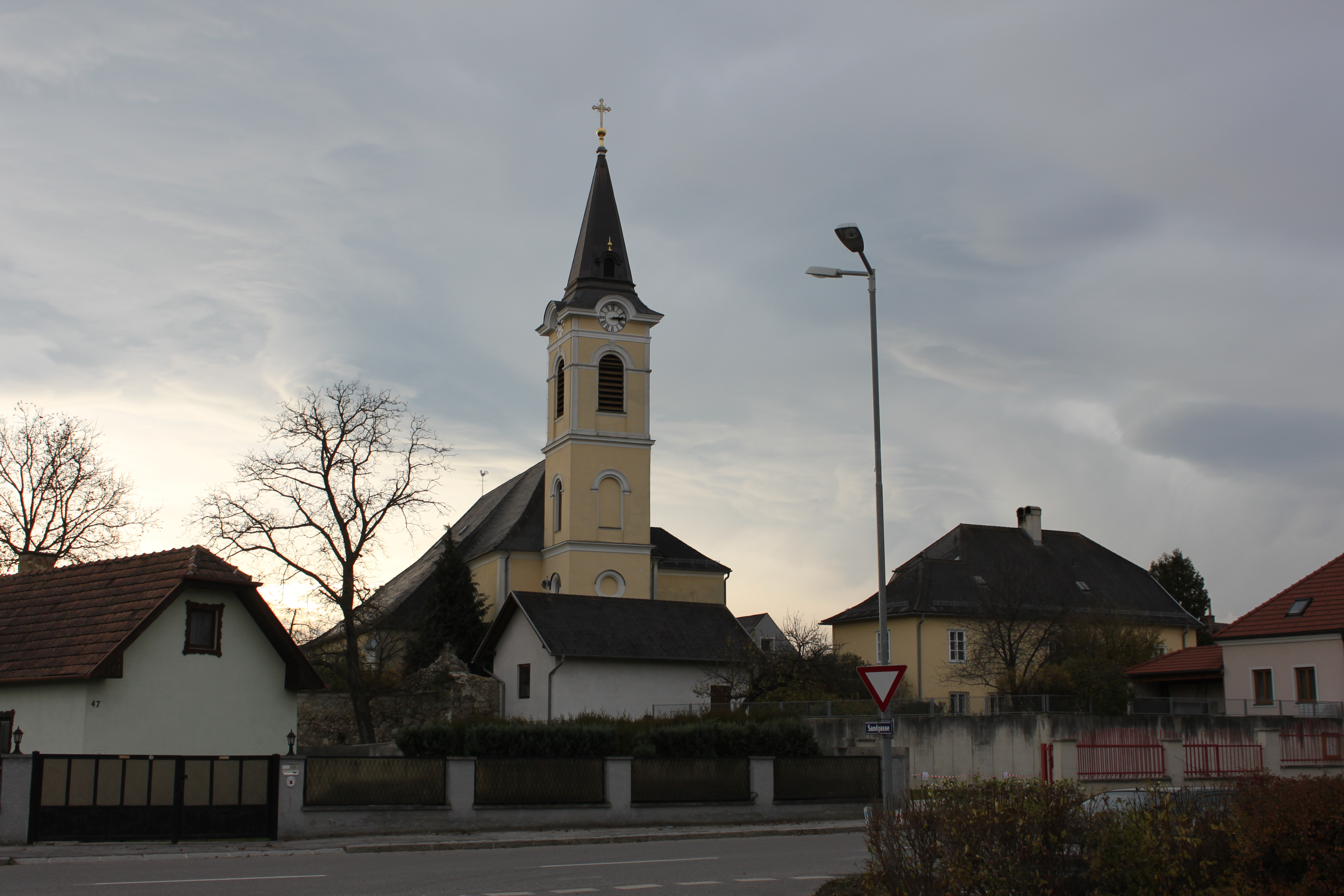 Nikolauskirche (Lanzenkirchen), rechts davon, Pfarrhof